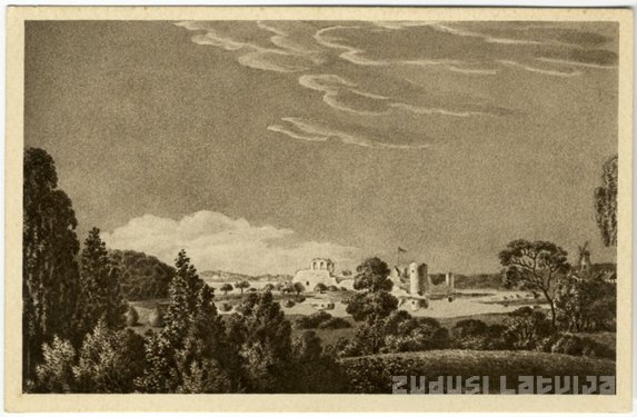 Vaade Aluliina linnusevaremetele edelast 1826.